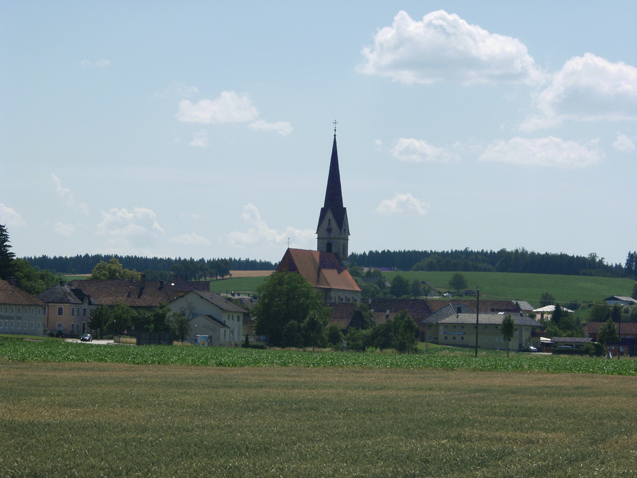 Weißkirchen an der Traun, Upper Austria